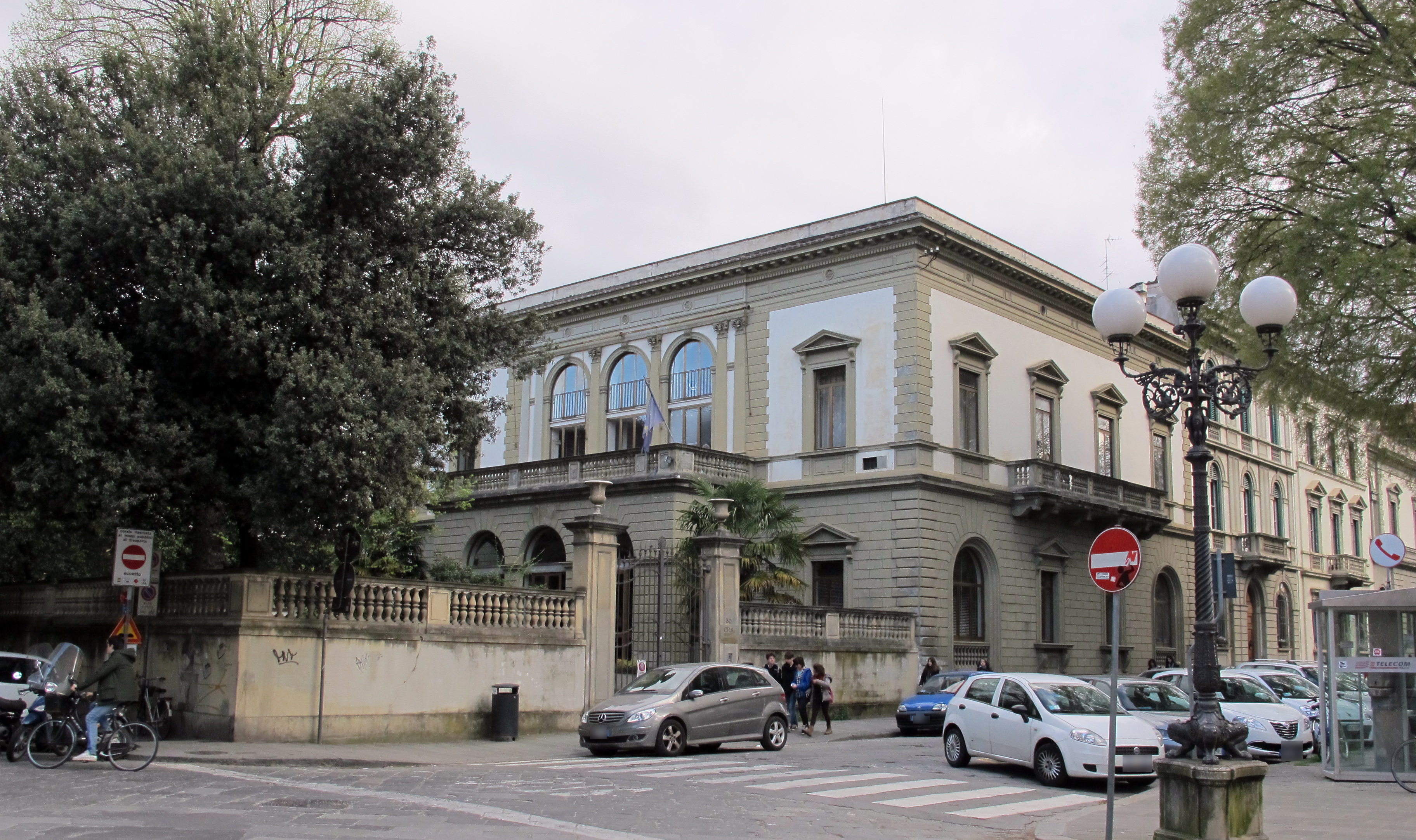 Villa sepp